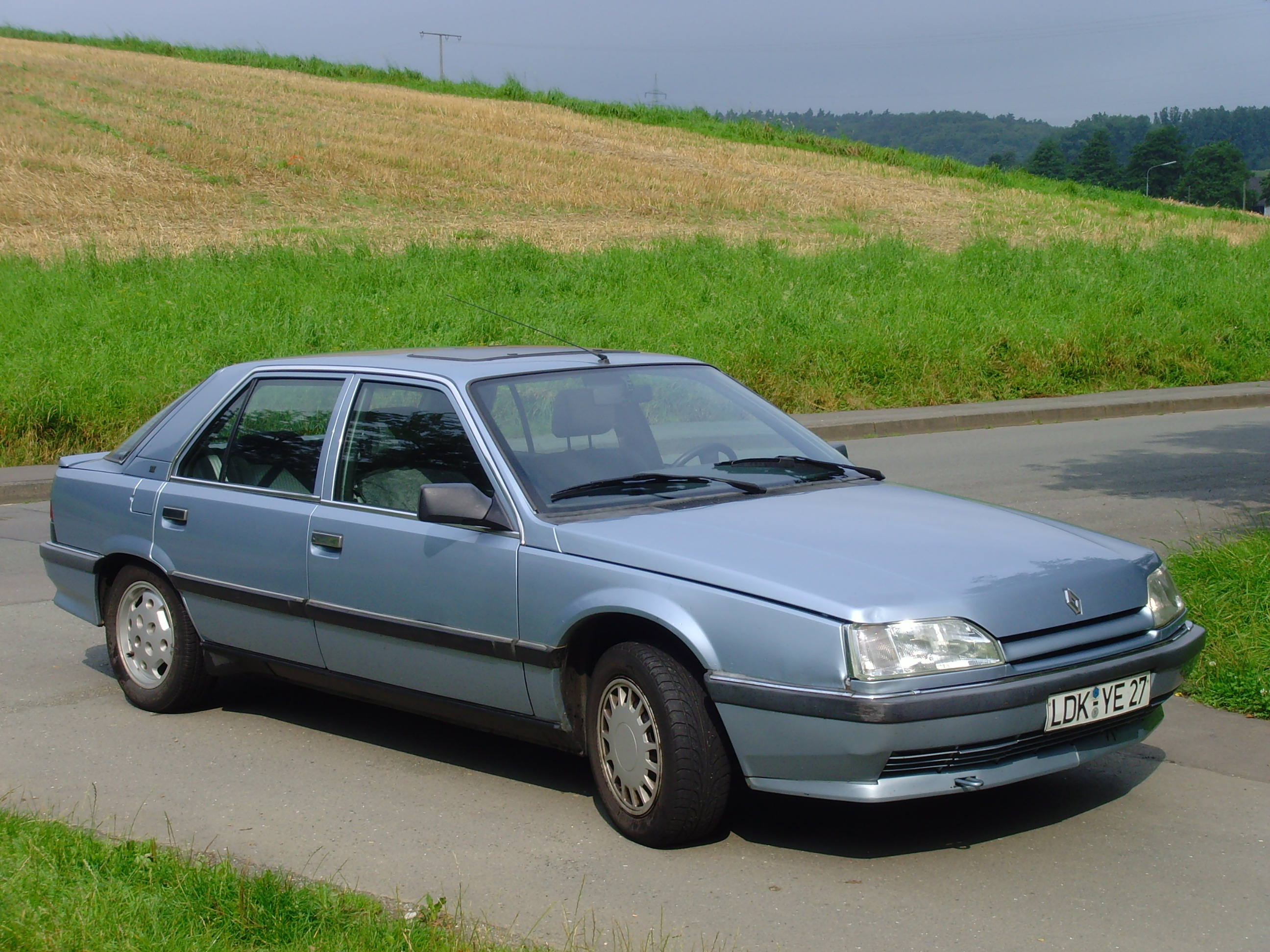 An Liebhaber zu verkaufen. 2. Rentnerhand. Erstzulassung 28.6.1991. Nur 113.000 km.